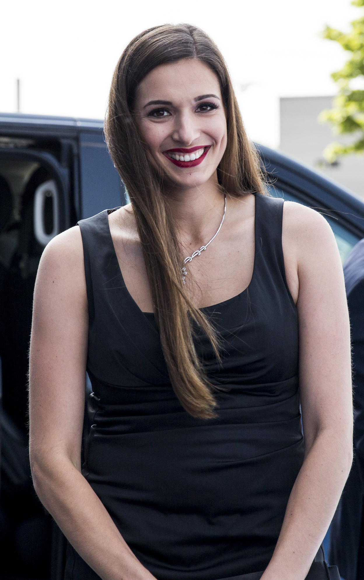 Saliha "Sally" Özcan auf dem Blue Carpet beim Webvideopreis Deutschland 2017